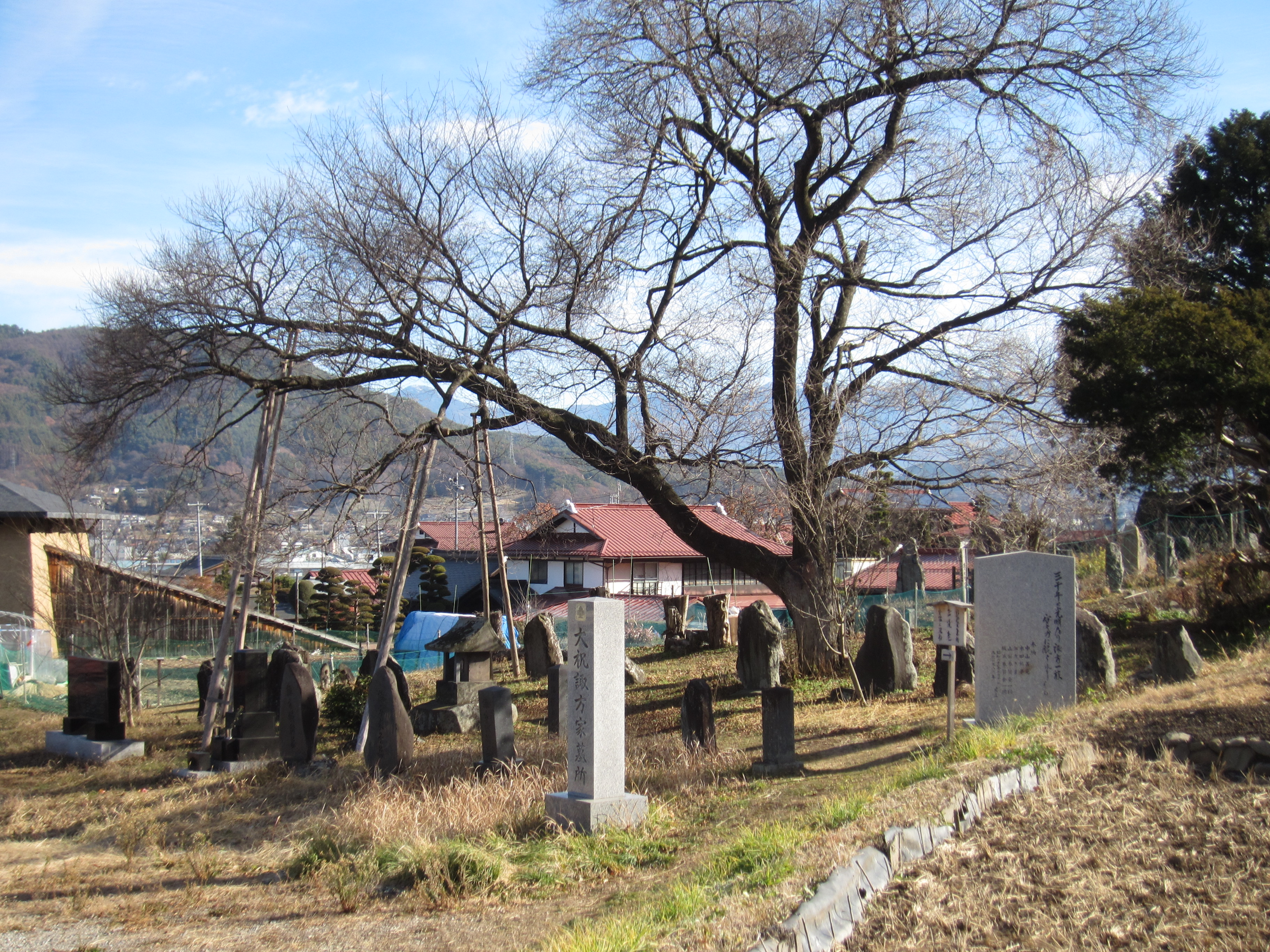 神長官守矢史料館 大祝墓所